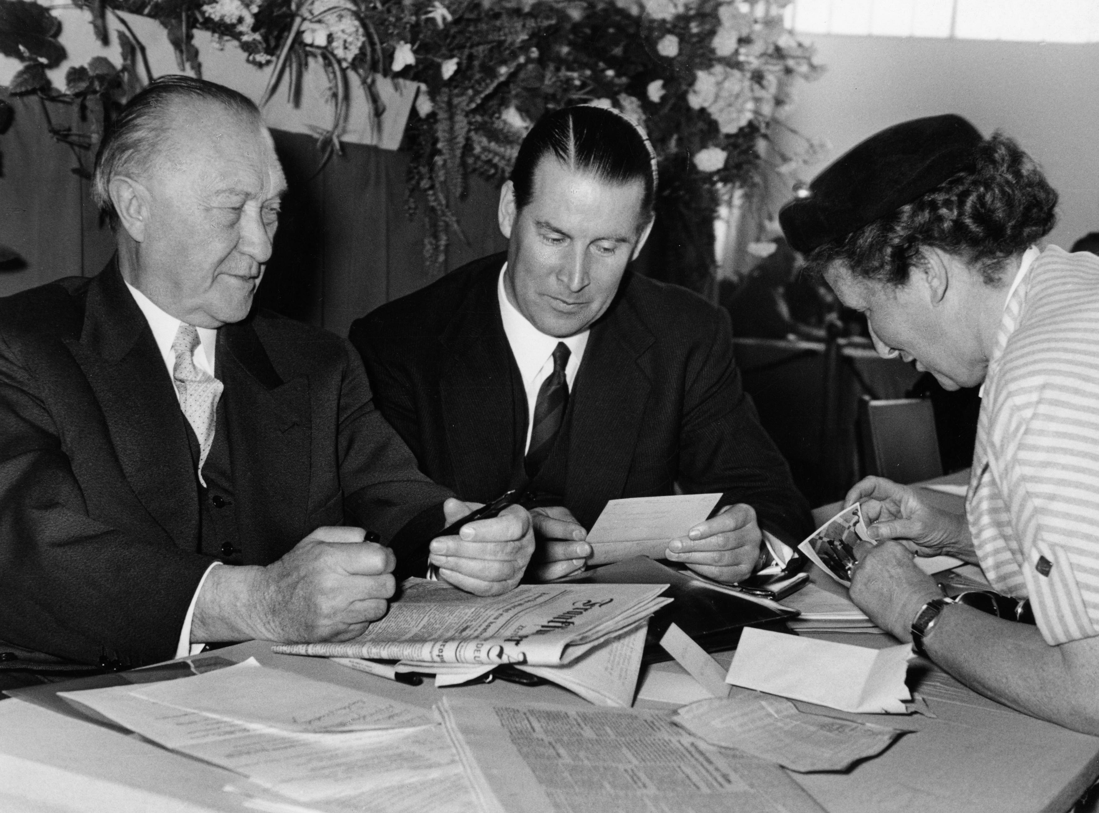 Adenauer, Konrad7. CDU-Bundesparteitag, 12.05.1957 - 15.05.1957